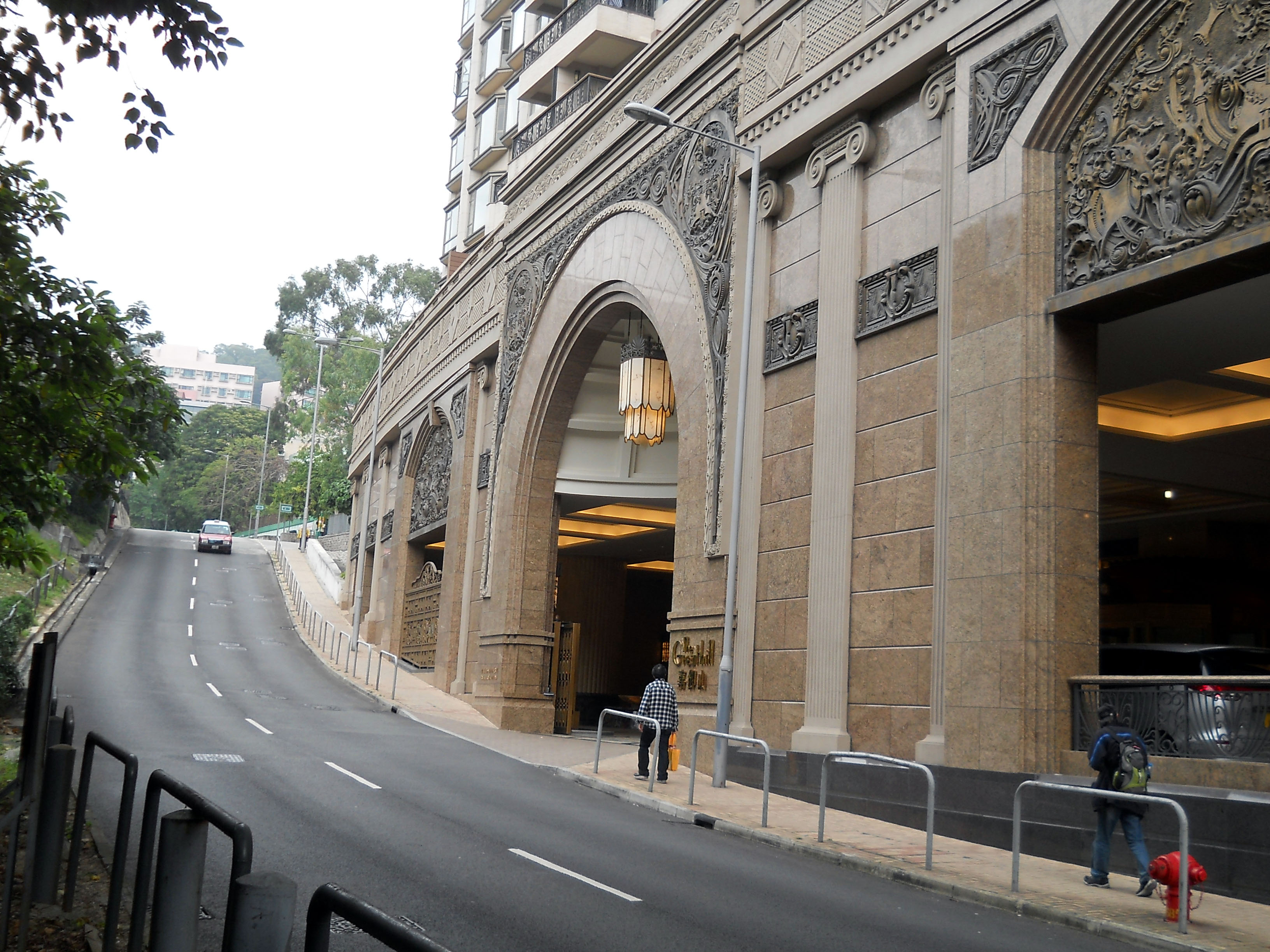 中文（香港）: 嘉御山